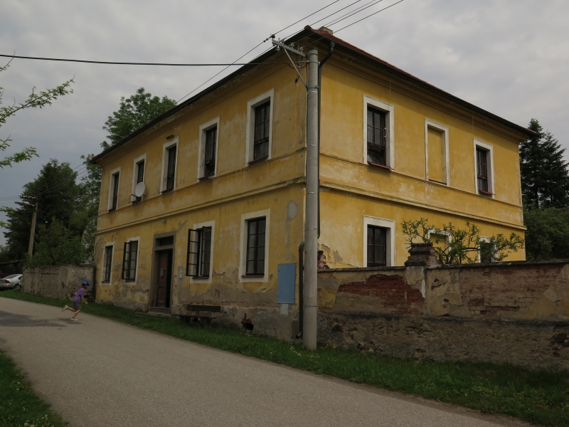 Bývalá fara, Hoštice 1, Hoštice (Nemyšl).